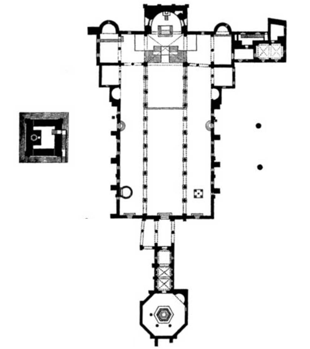 Plan of the Aquileia basilica as existent in early 20th century